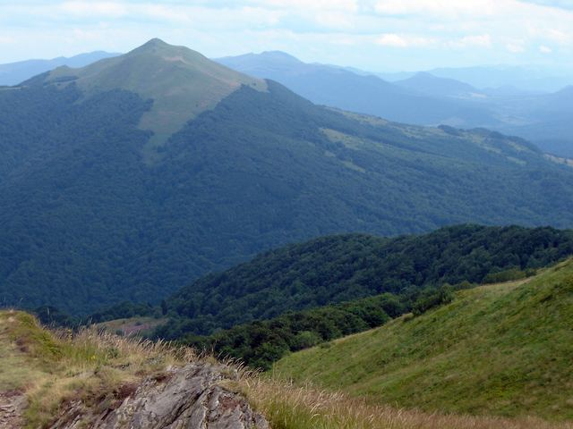 Połonina Caryńska (Bieszczady) - view from Połonina Wetlińska